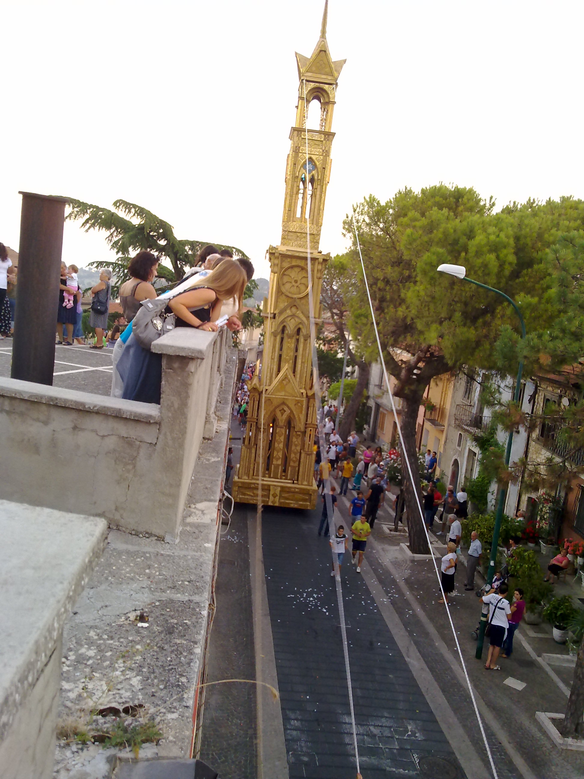 Tirata del giglio 2010